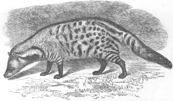 Viverra zibetha